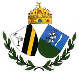 coat Budapest 22 district